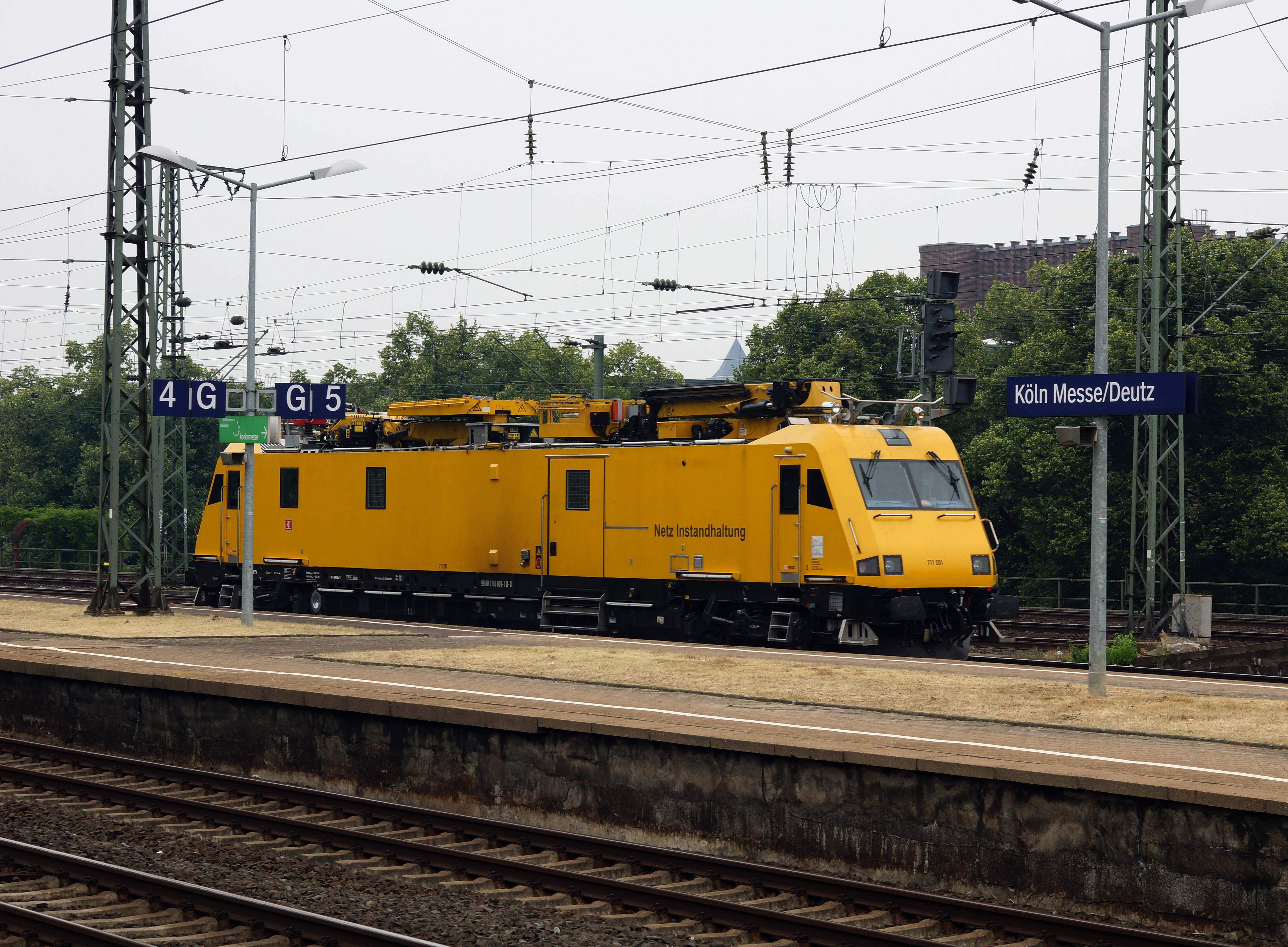 711-201 in Köln-Deutz.